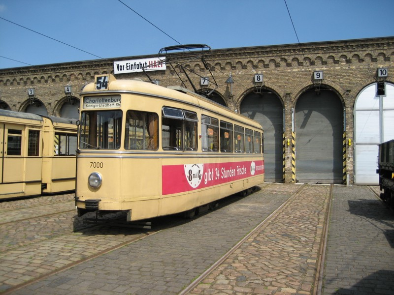 TED 52 der Berliner Straßenbahn vorm Depot Nordend